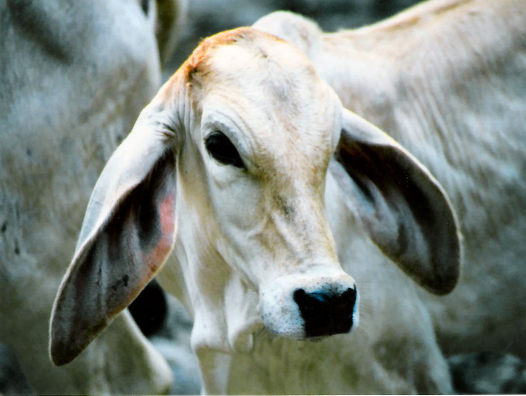 Brahman Baby.